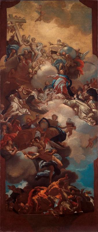 Jan Jiří Etgens, Triumf Víry (1720), Moravská galerie v Brně